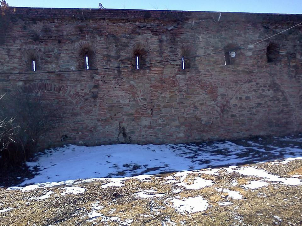 Ruine chilii 03